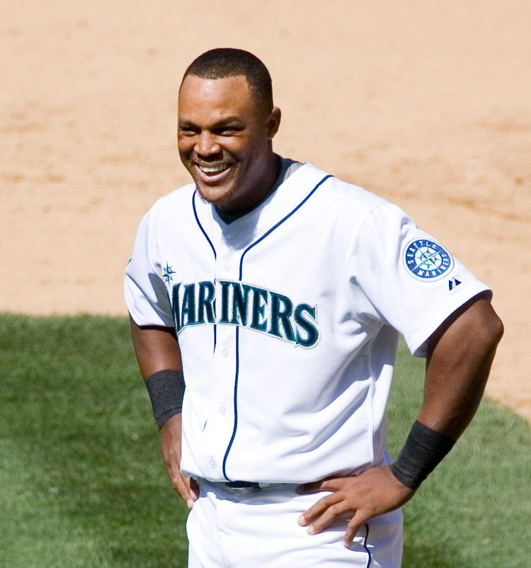 A closeup of Adrián Beltré.